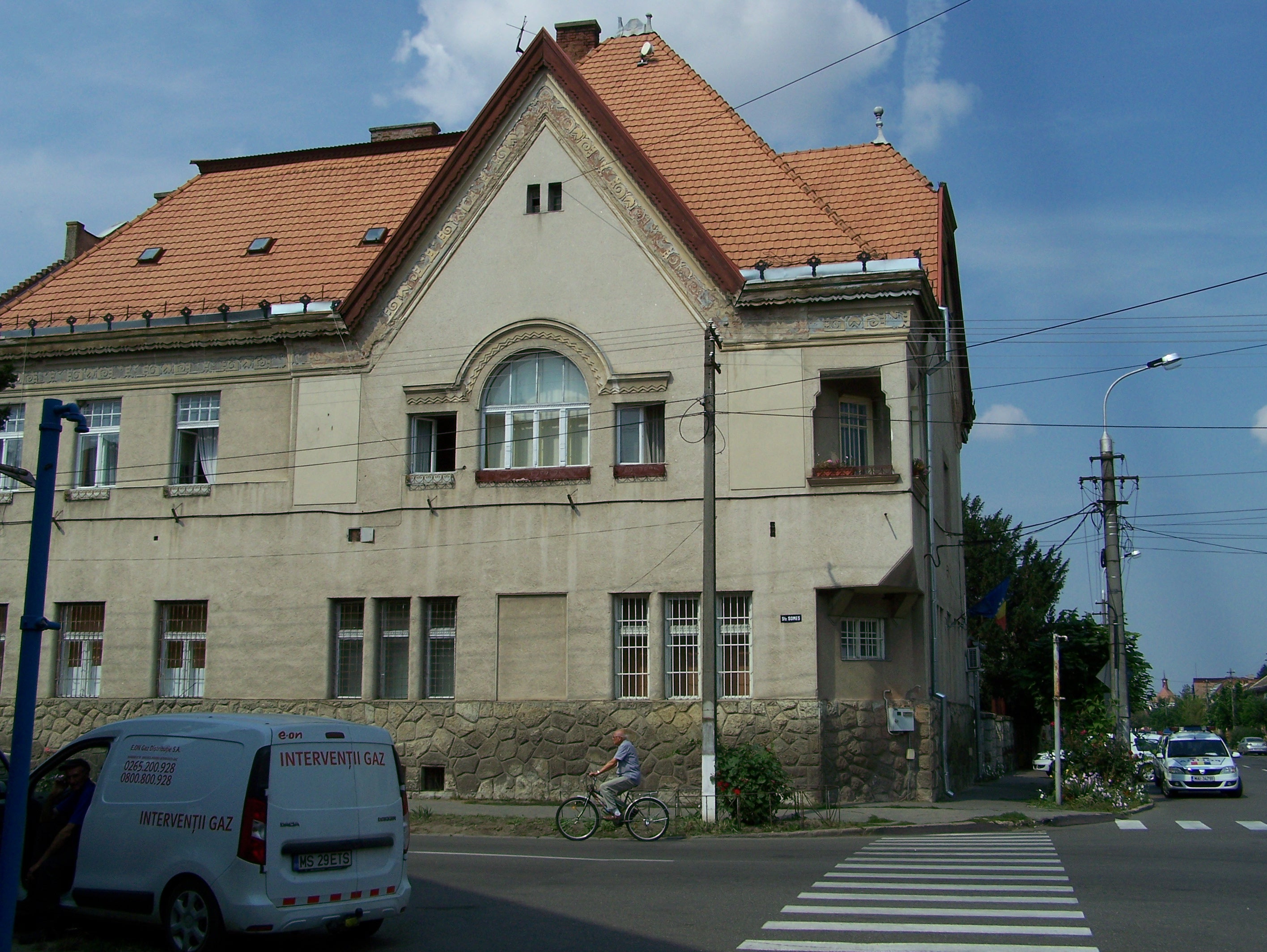 Inspectoratul de Poliție